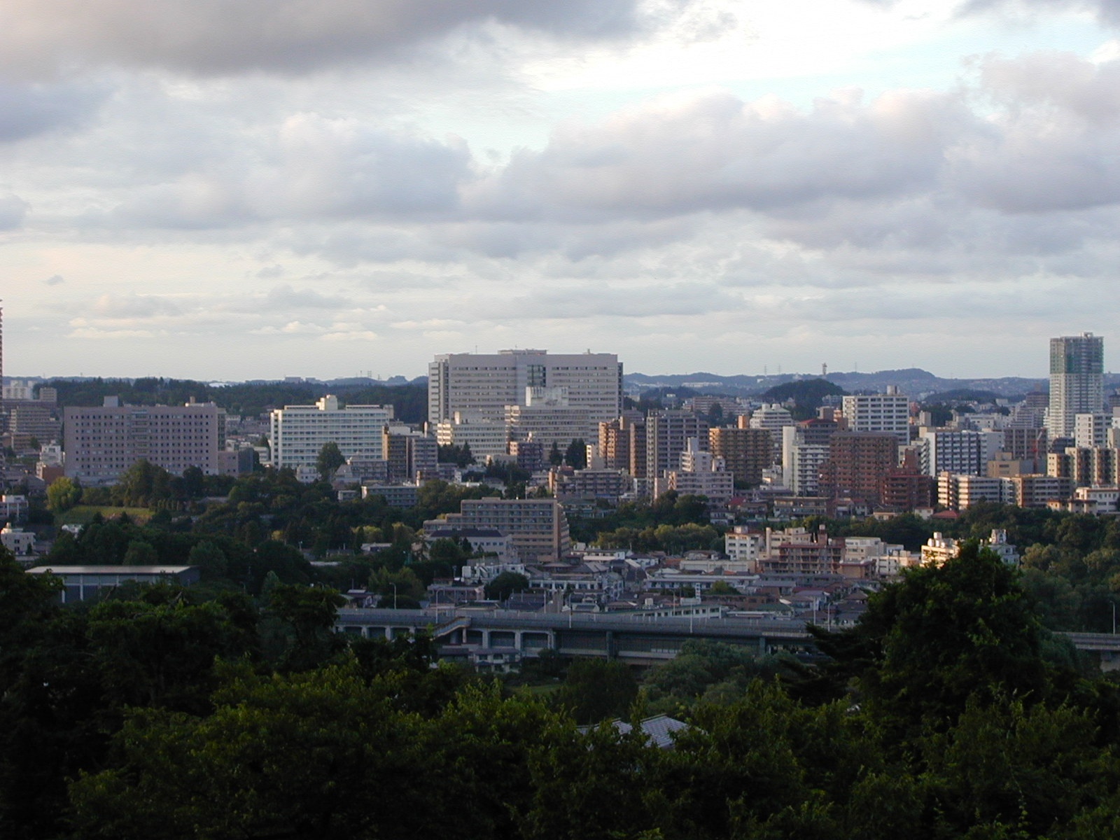 仙台城天守台から撮影した東北大学病院